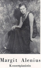 Margit Alenius 1931b